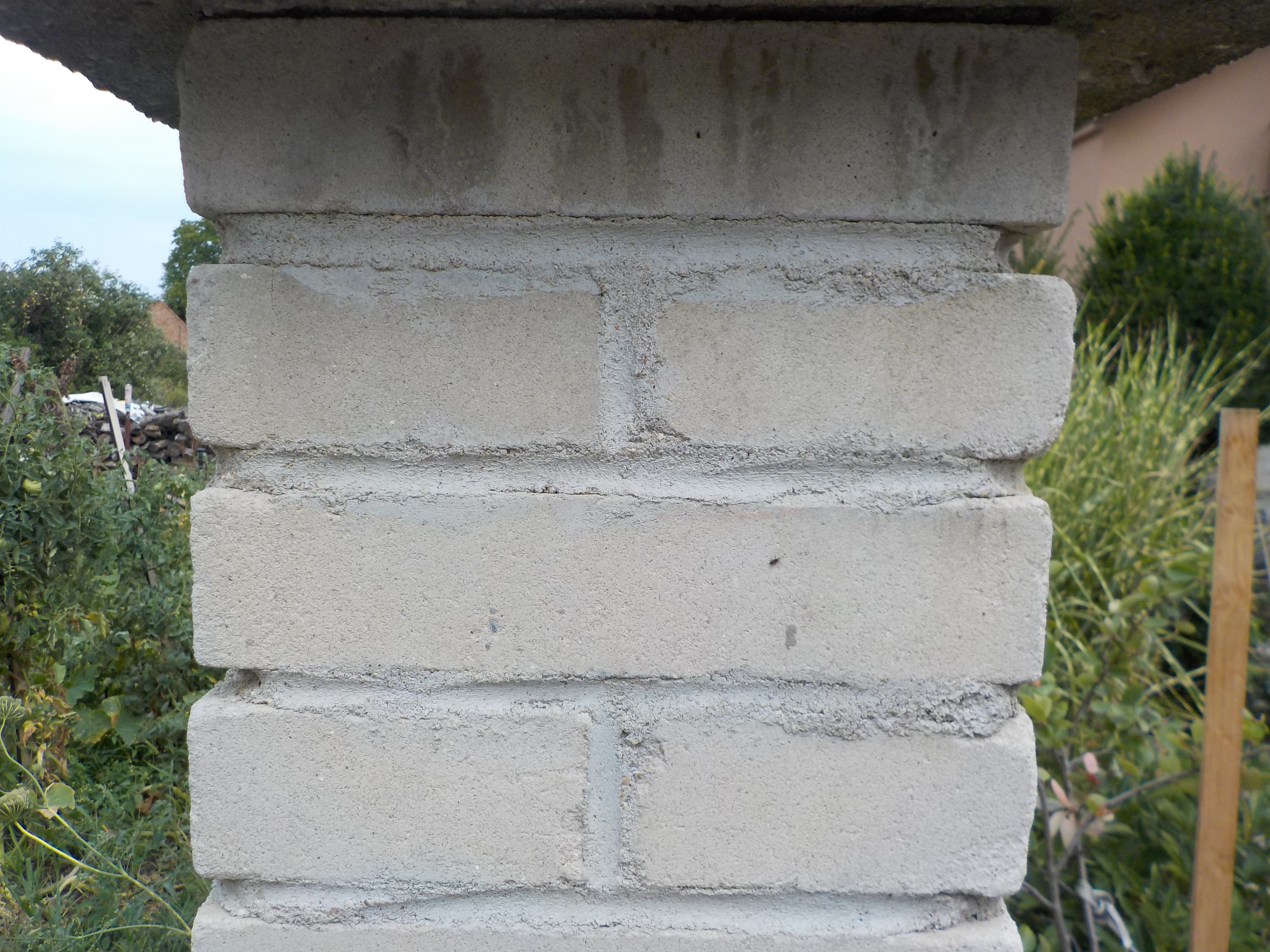 Cemento-vápenná malta spojující bílé cihly.